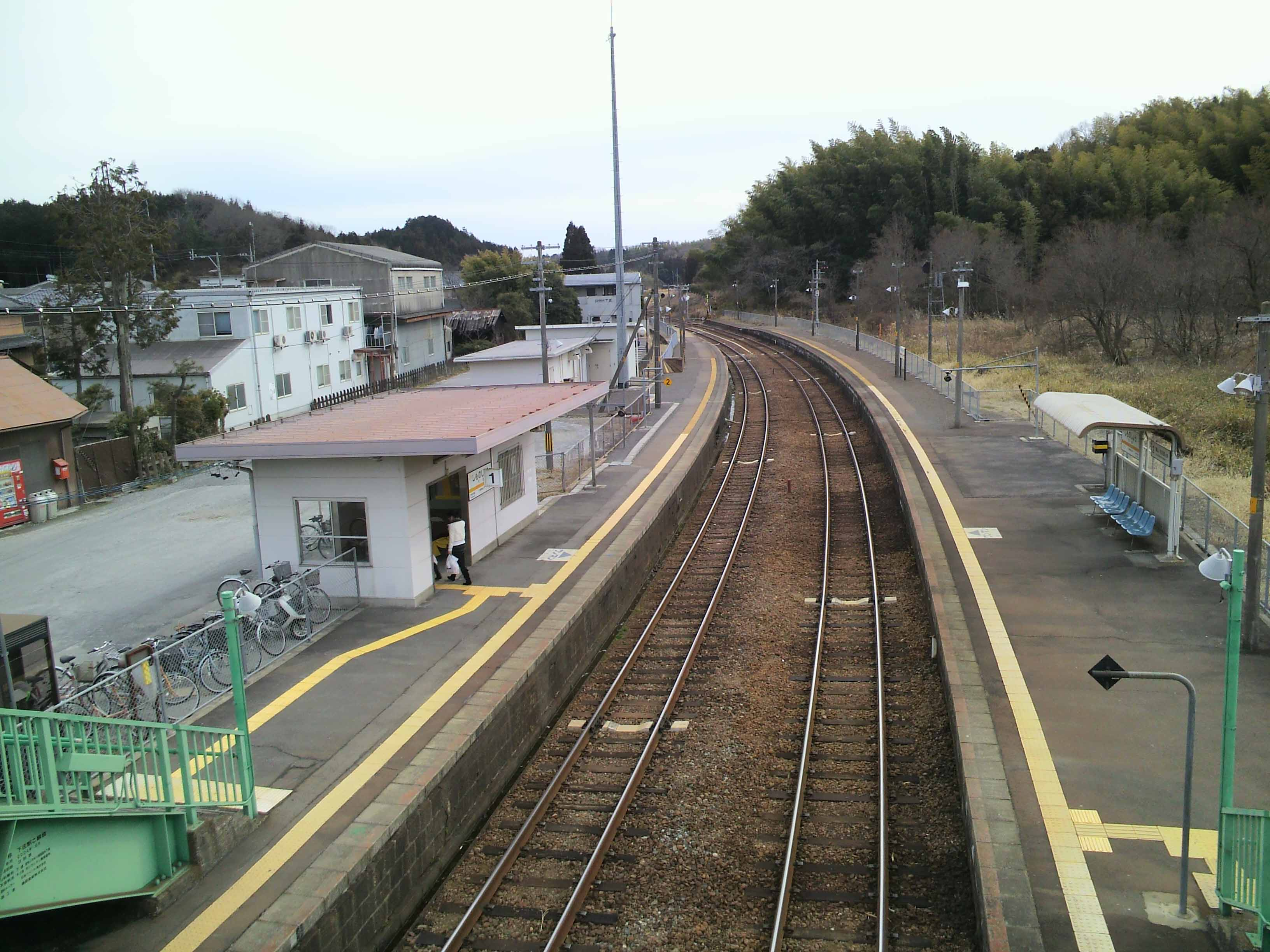 下庄駅プラットホーム